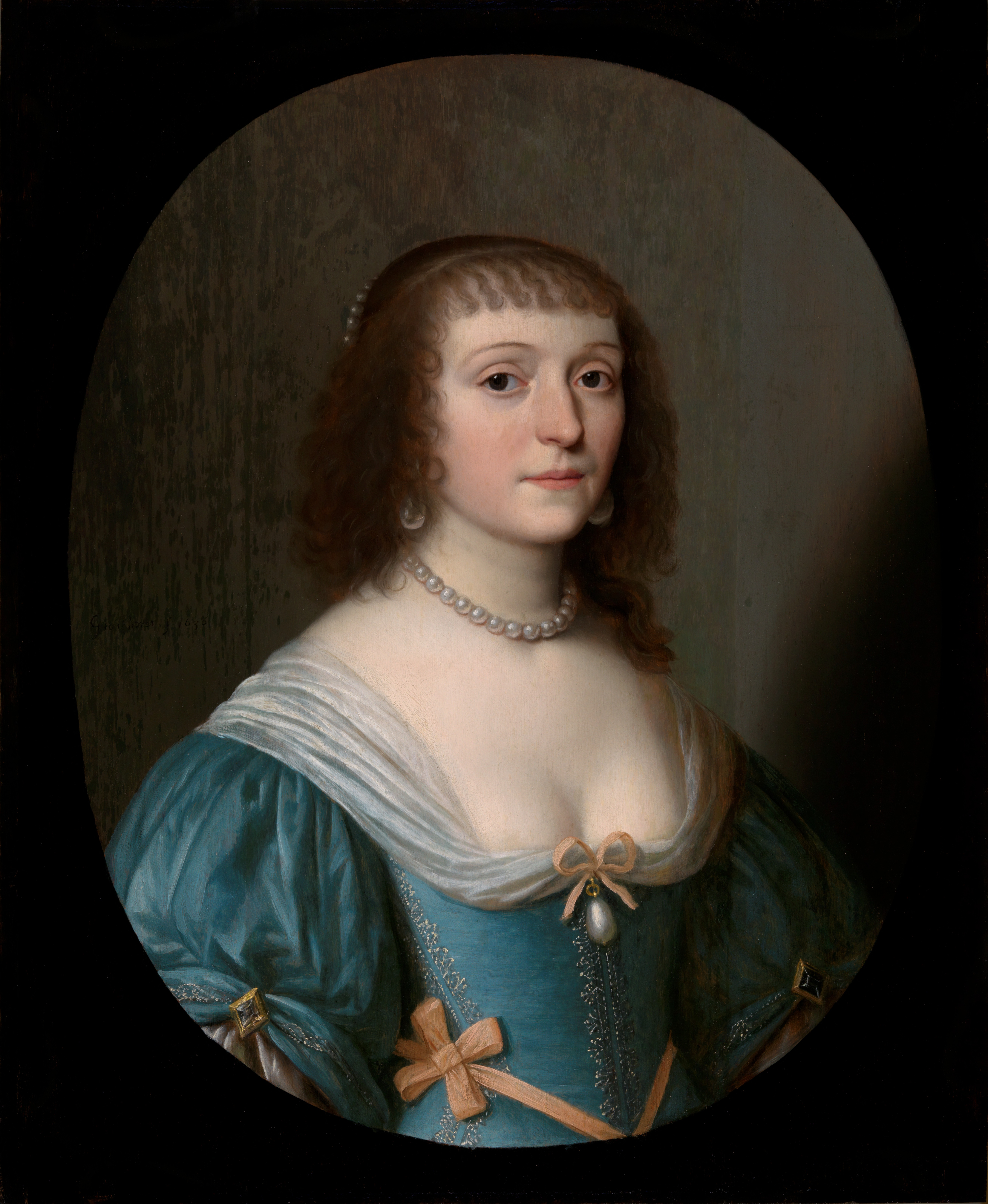 Eleonora Mauritia, vernoemd naar haar oom prins Maurits (1567-1625), was het negende kind van prinses Emilia van Oranje (1569-1629) en prins Emanuel van Portugal (1568-1638)